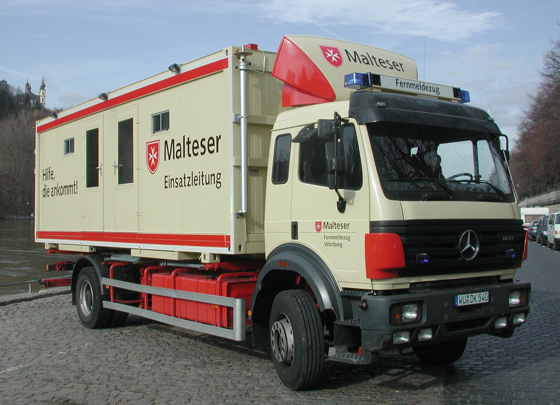 Einsatzleitwagen 2 des Fernmeldezugs des Malteser Hilfsdienstes aus Würzburg. Weitere Informationen: Homepage der Malteser in Würzburg